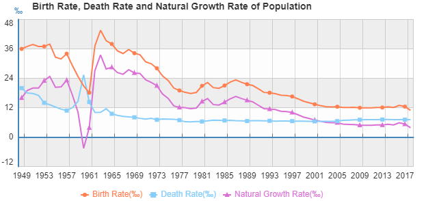 Естественное движение Китая 1948-2018